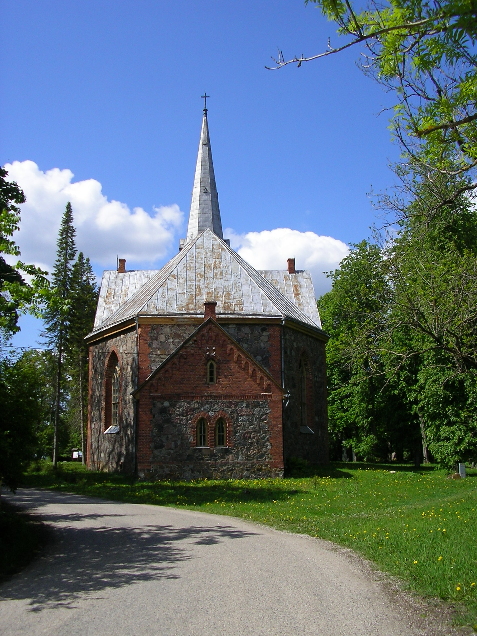 Die Andreaskirche in Äksi